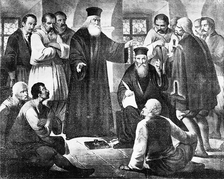 Из српског устанка: Хаџи Ђеро и Хаџи Рувиме. Павле Симић.